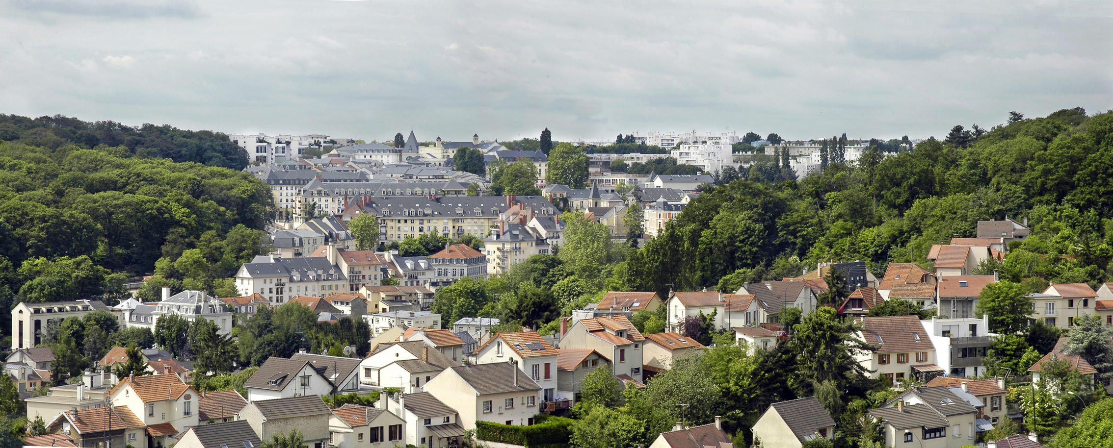 Vue panoramique du Plessis Robinson ville verte